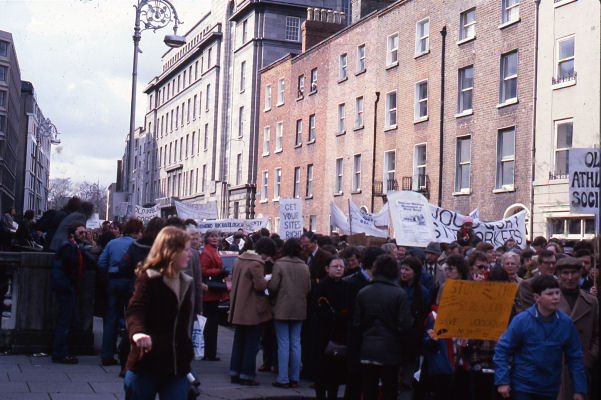 Manifestation pour la préservation du site archéologique de Wood Quay, Dublin, Irlande